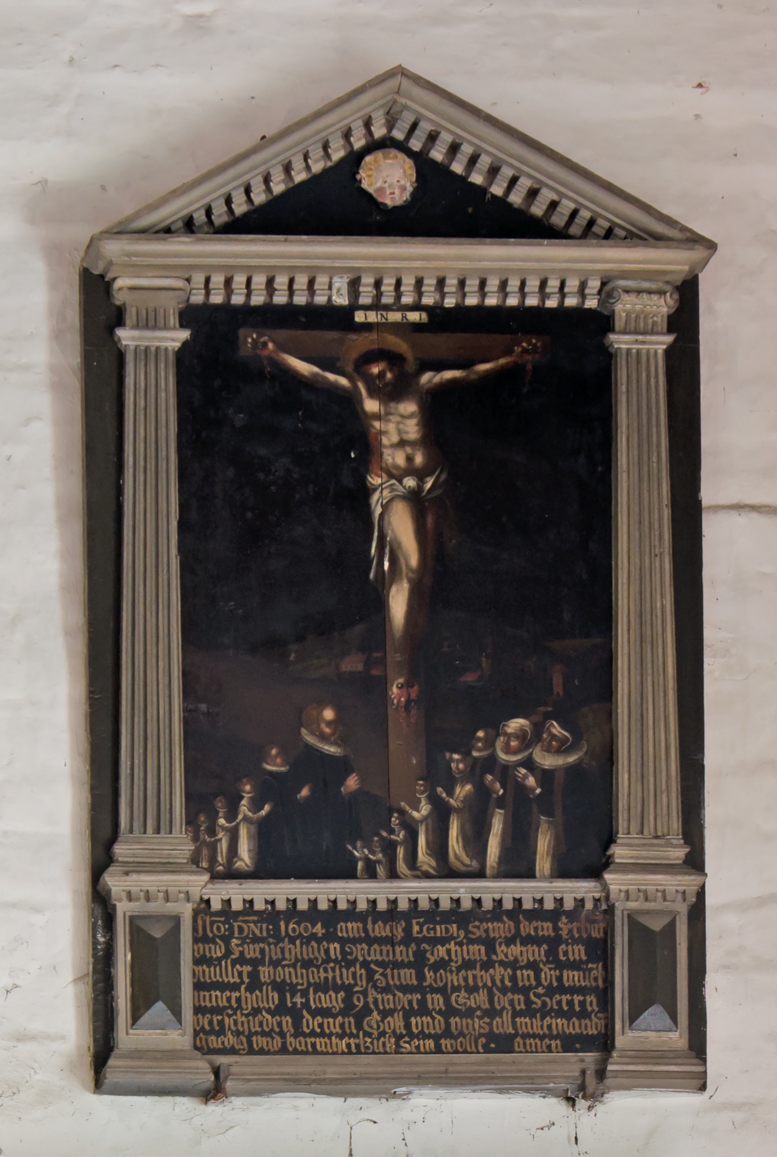 Epitaph des Jochim Kohne in der Kirche St. Godehard (Kessin) Inschrift: A(nn)o: D(omi)ni: 1604 am Tage Egidi seind dem Erbar und Fürsichtigen Manne Jochim Kohne, ein Müller wohnhafftich zum Kosterbeke in d(e)r müēl innerhalb 14 tage 9 Kinder in Gott den Herrn verschieden, denen Gott und vnss all miteinand(e)r gnedig und barmhertzick sein wolle - amen